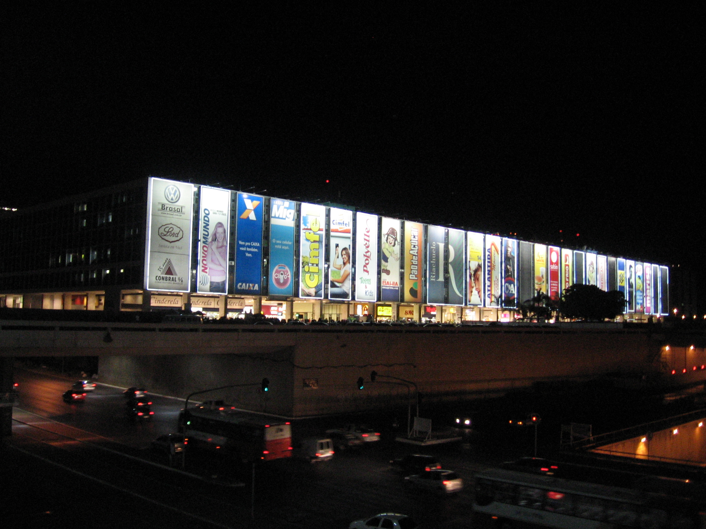 Conjunto Nacional, a Shopping Center in Brasília, Brazil